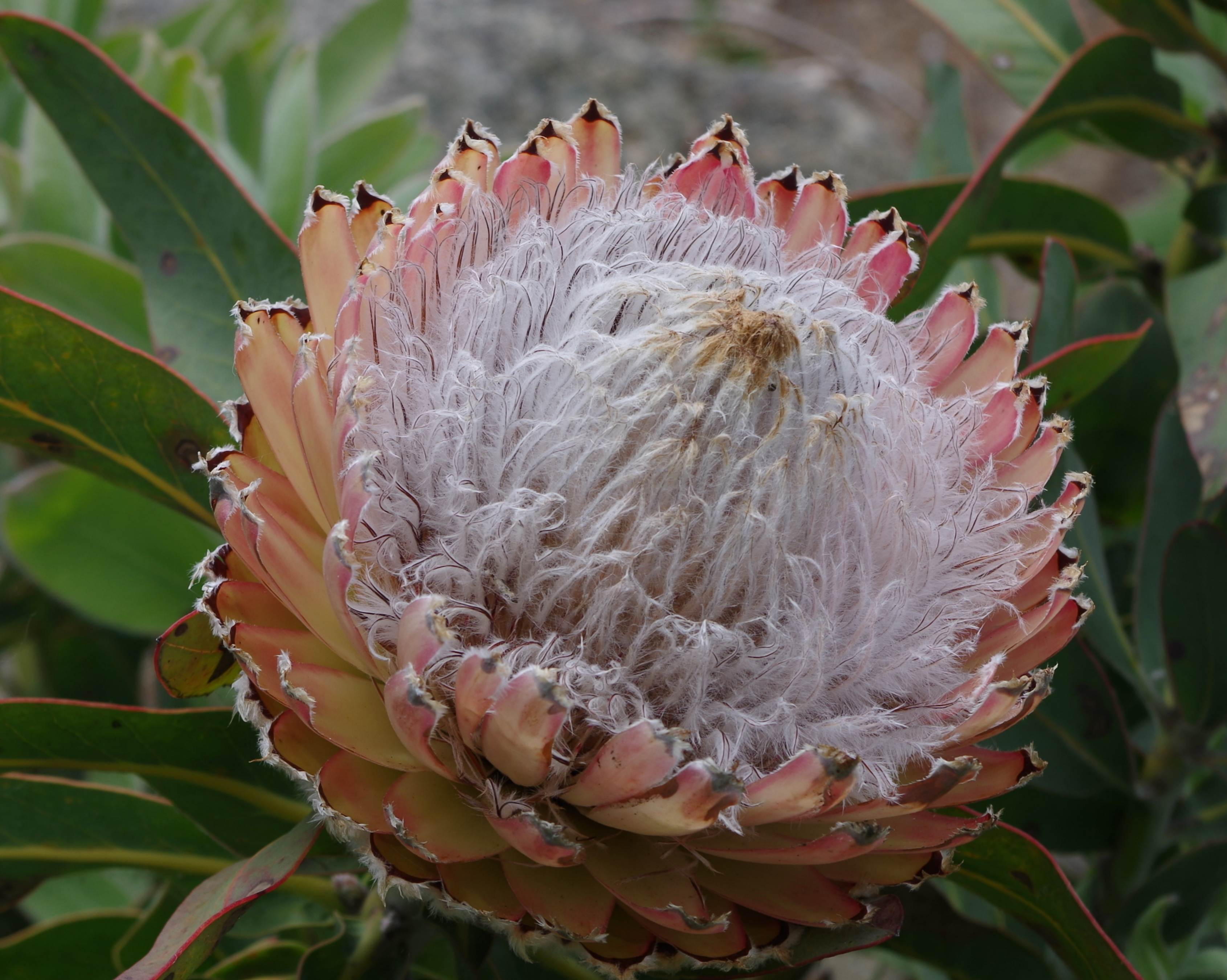 Protea - Jardin exotique de Roscoff